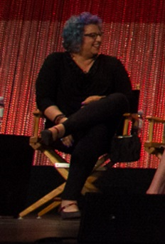 at Paley Fest